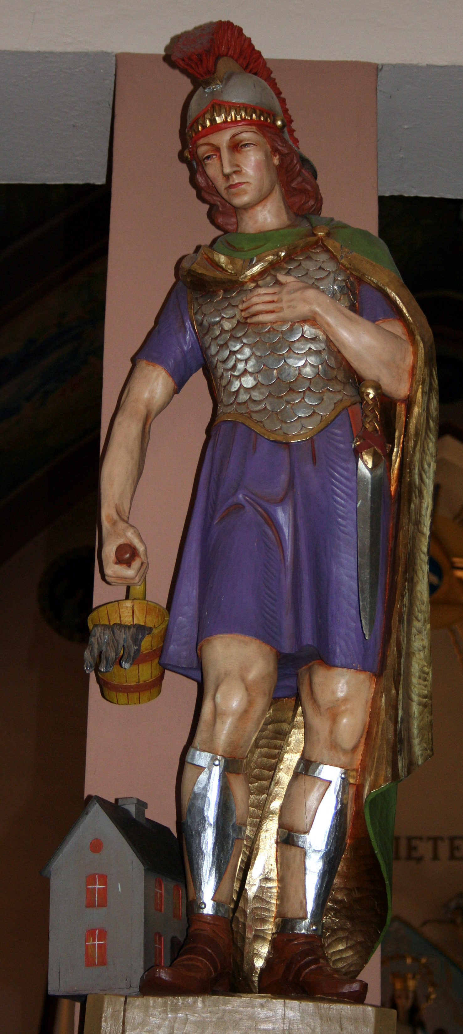 Figura świętego Floriana w kościele Matki Boskiej Szkaplerznej w Rybniku - Zebrzydowicach